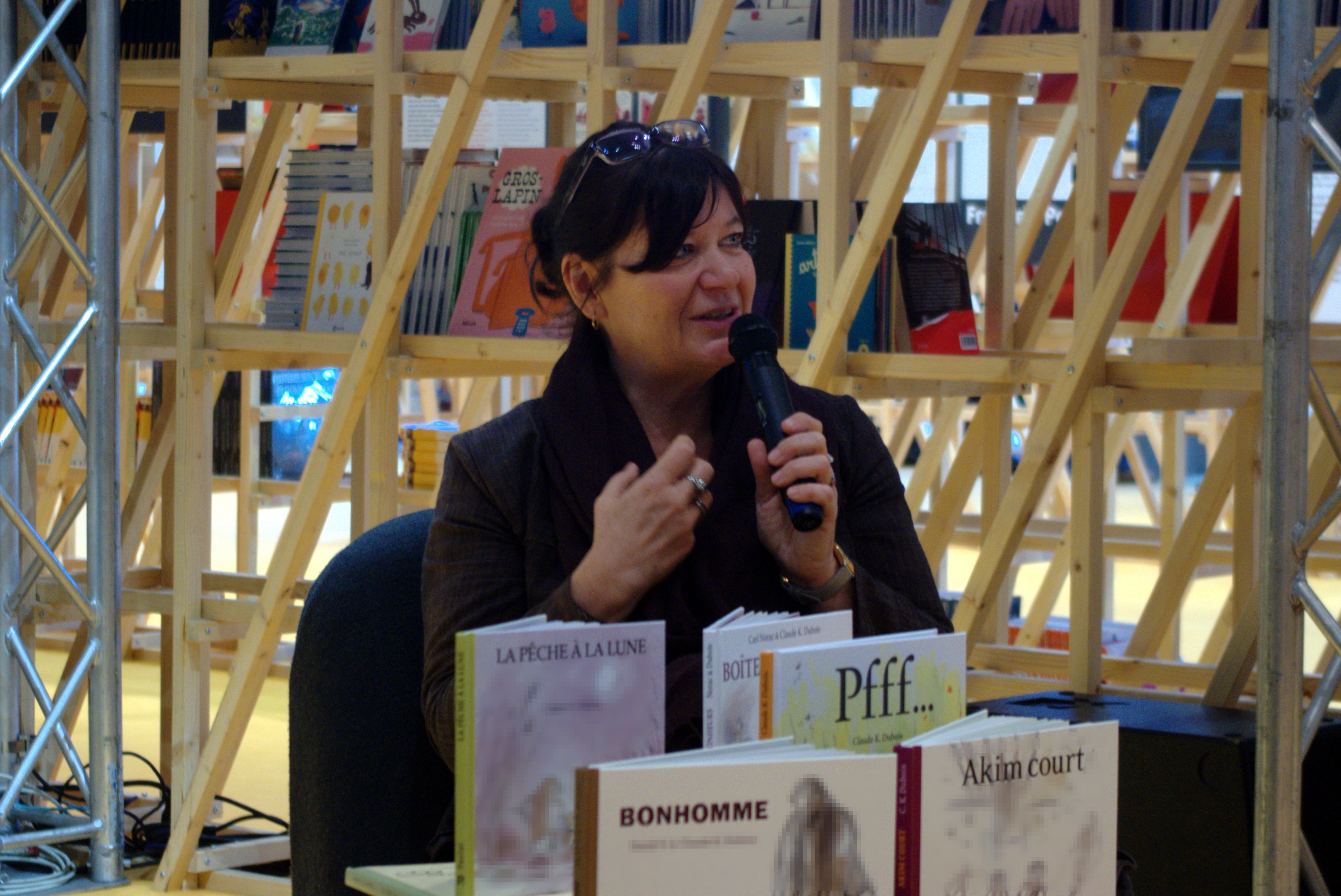 Frankfurter Buchmesse 2017. Die belgische Autorin und Illustratorin Claude K. Dubois.